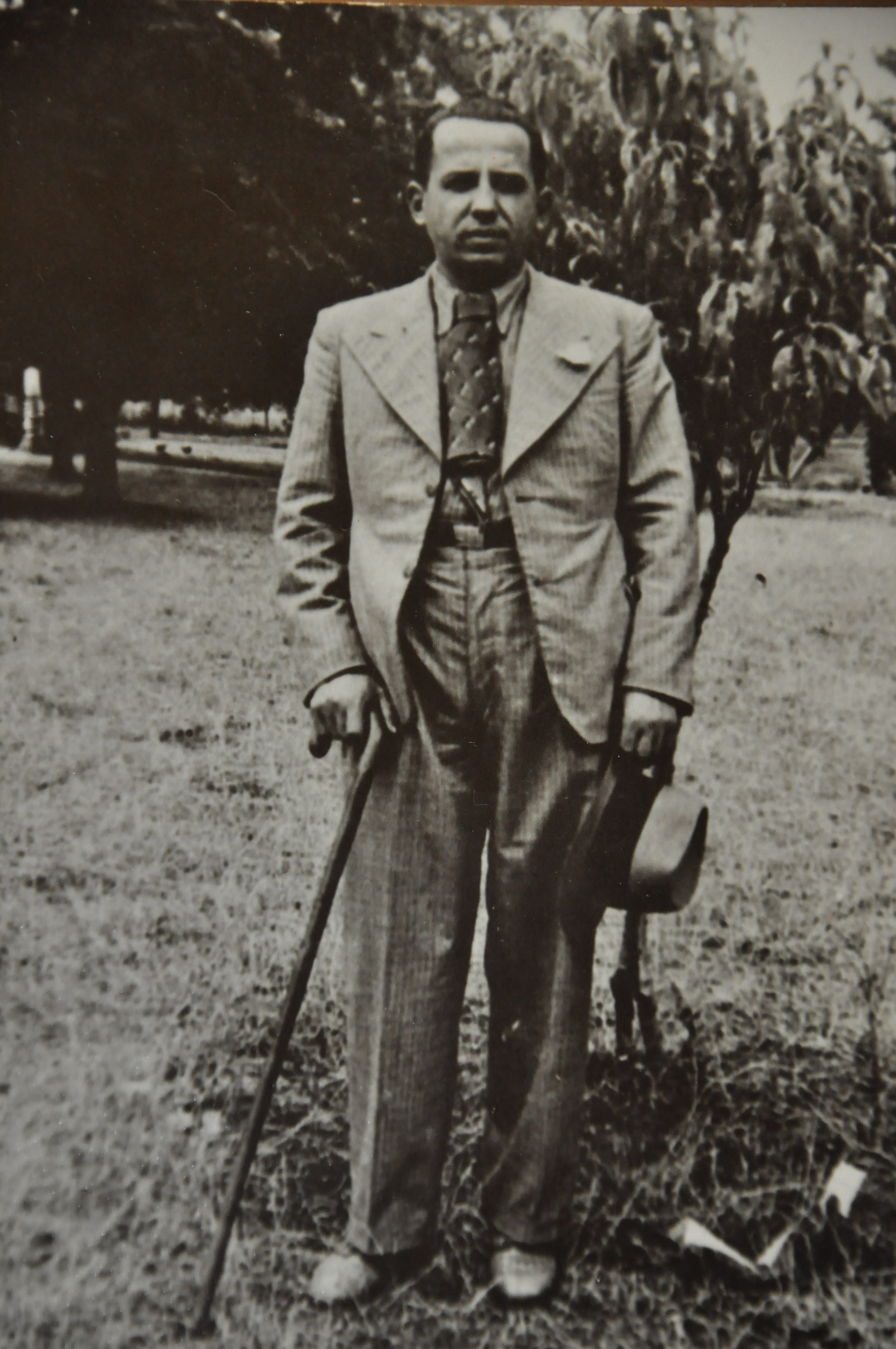 Prvi lekaru Vraniću, Čedomir Ignjačević